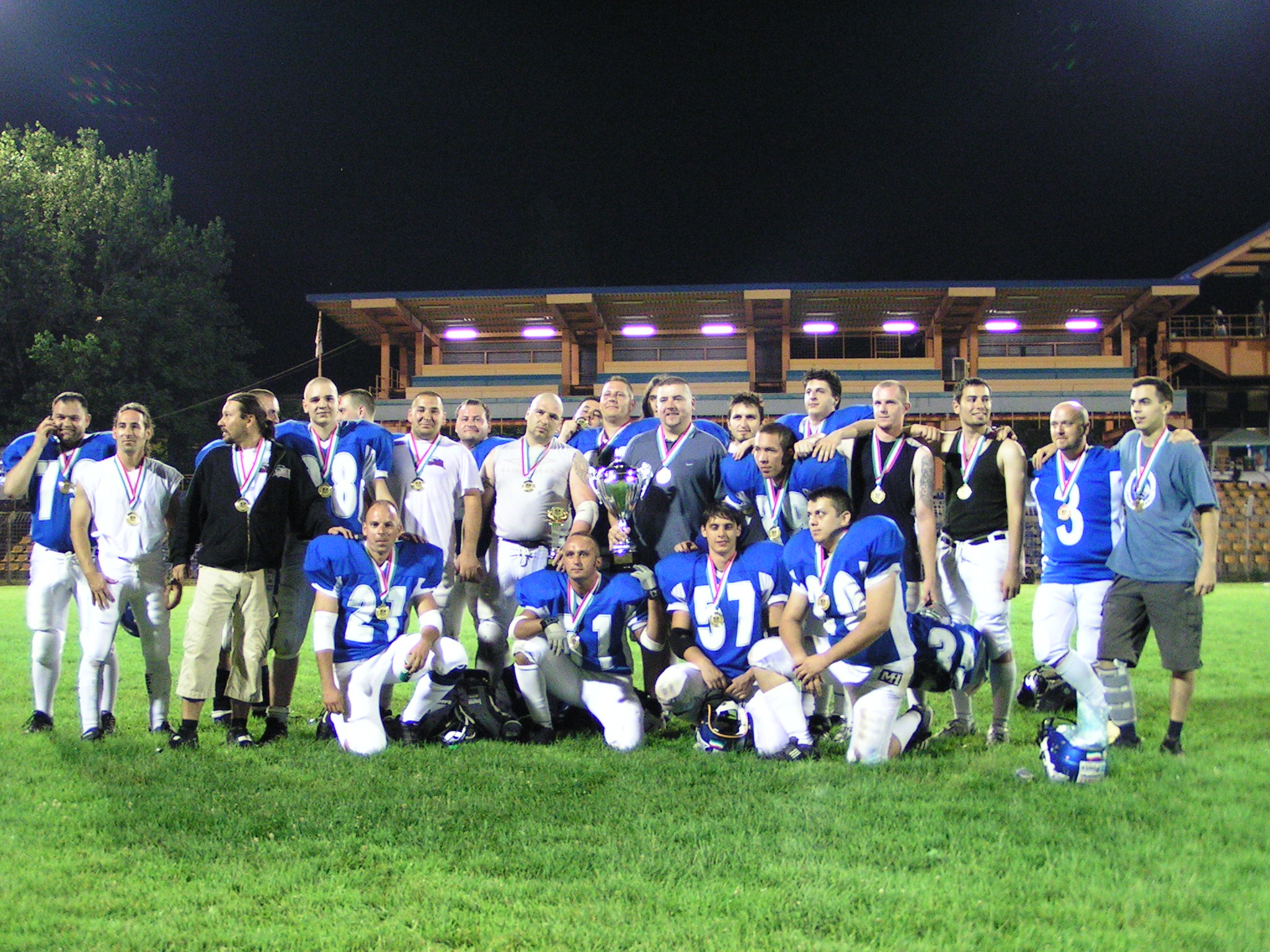 A II. Hungarian Bowl bajnokcsapata, a Győr Sharks (BVSC-stadion, Budapest)